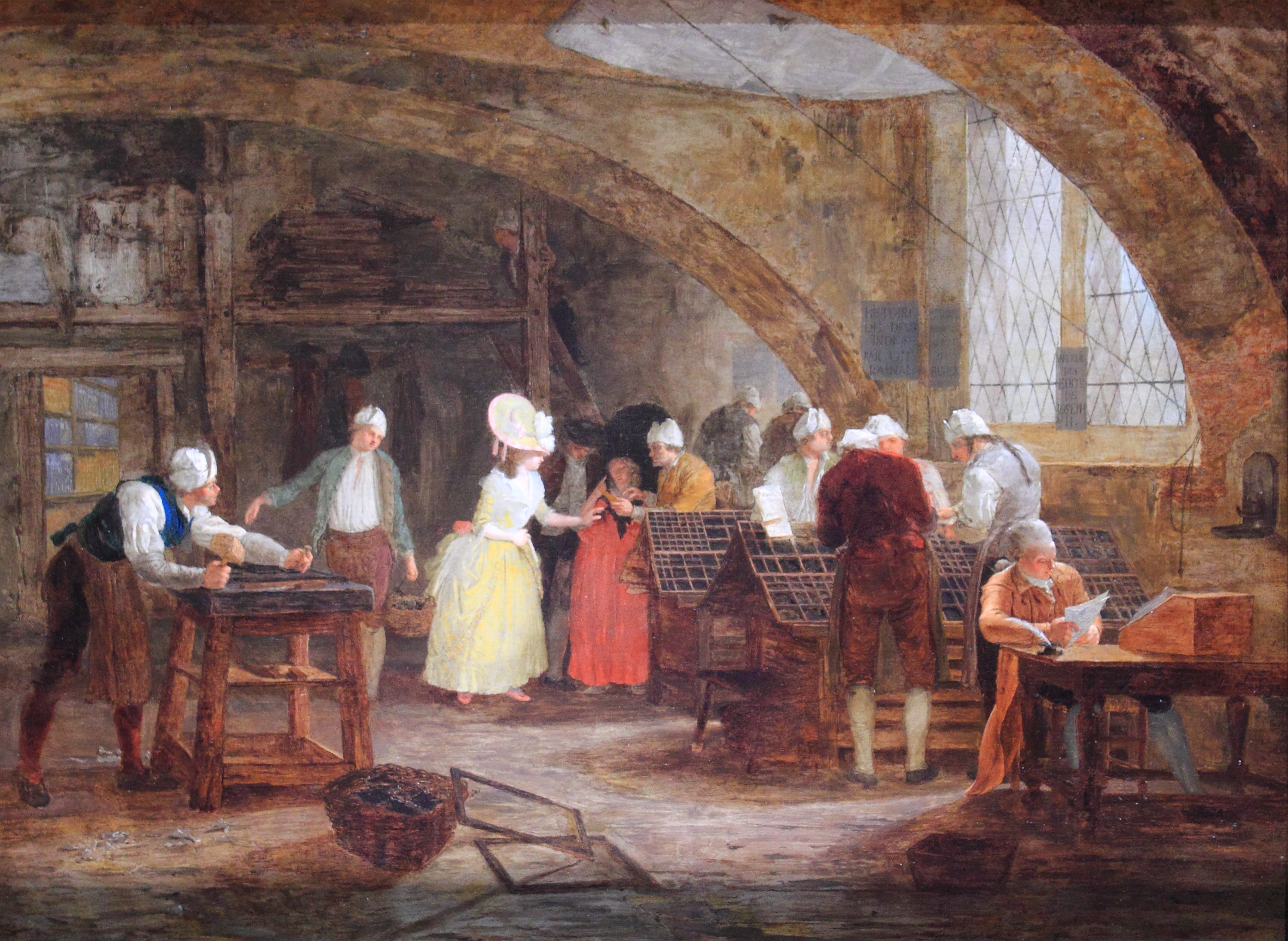 La Visite à l'imprimerie